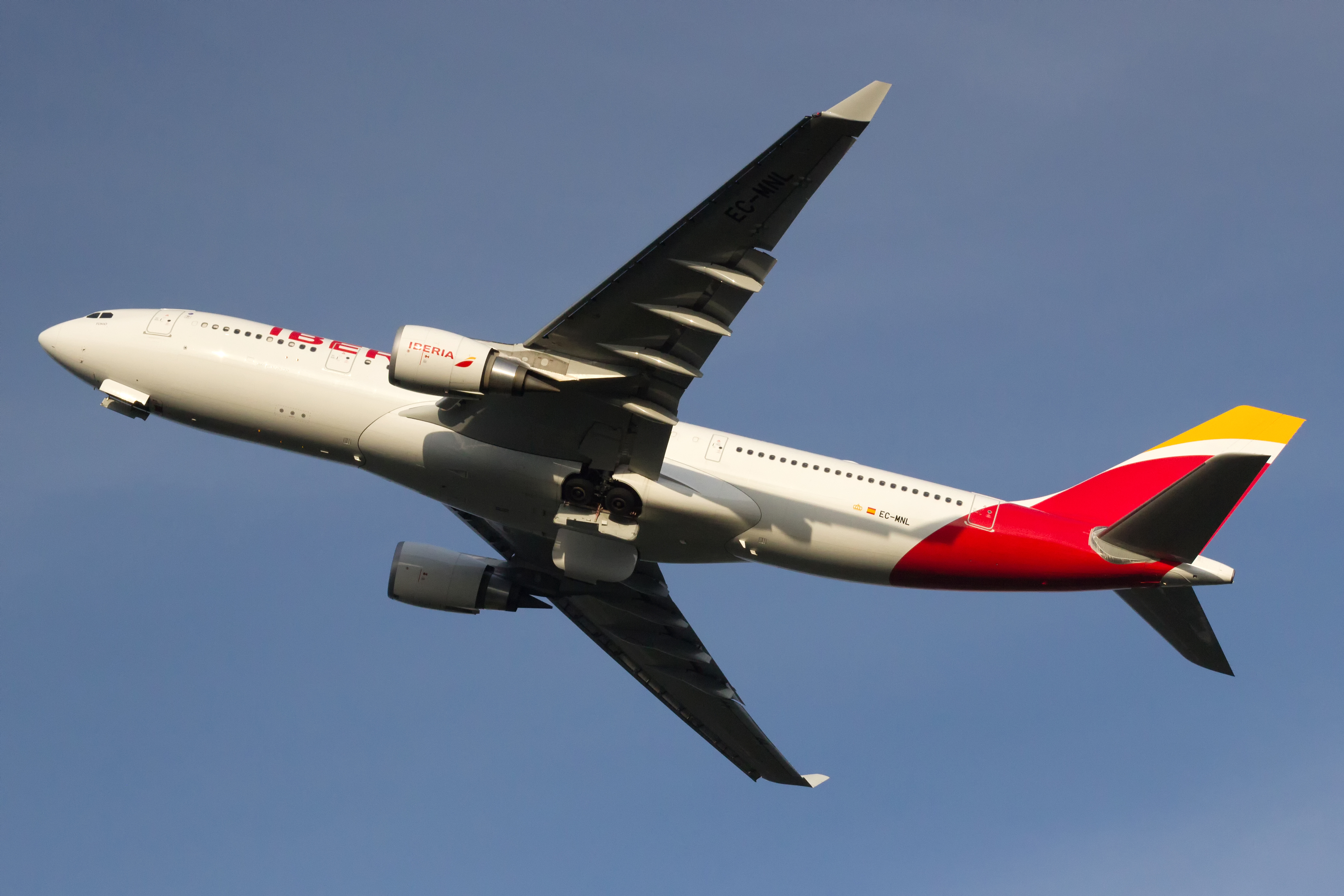 Airbus A330 de Iberia despegando do aeroporto de Vigo.